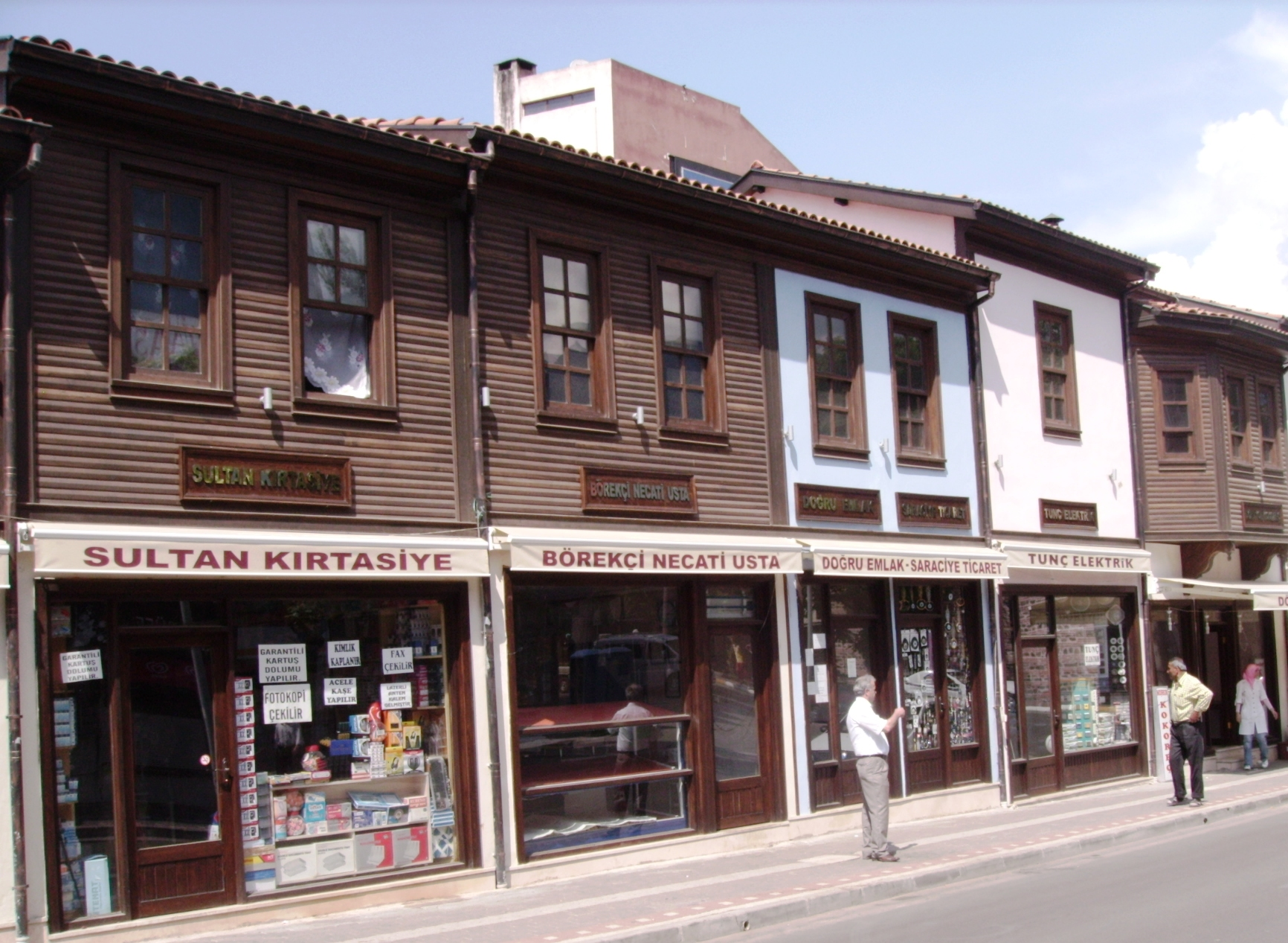 bursa-cumhuriyet caddesi-restore edilmiş dükkanlar